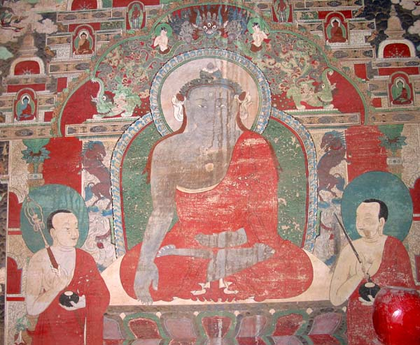 600 Jahre alte Wandmalerei im Kloster Qutan Si, Ledu/Qinghai